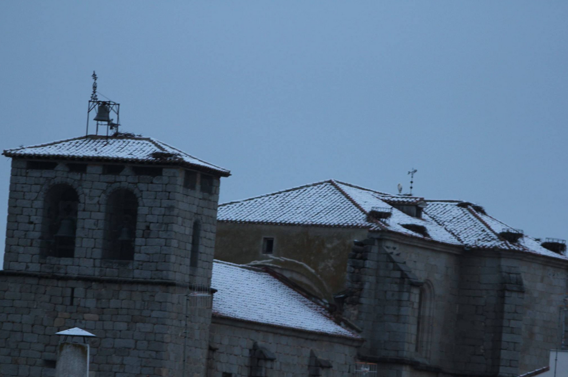 Iglesia de Alaraz